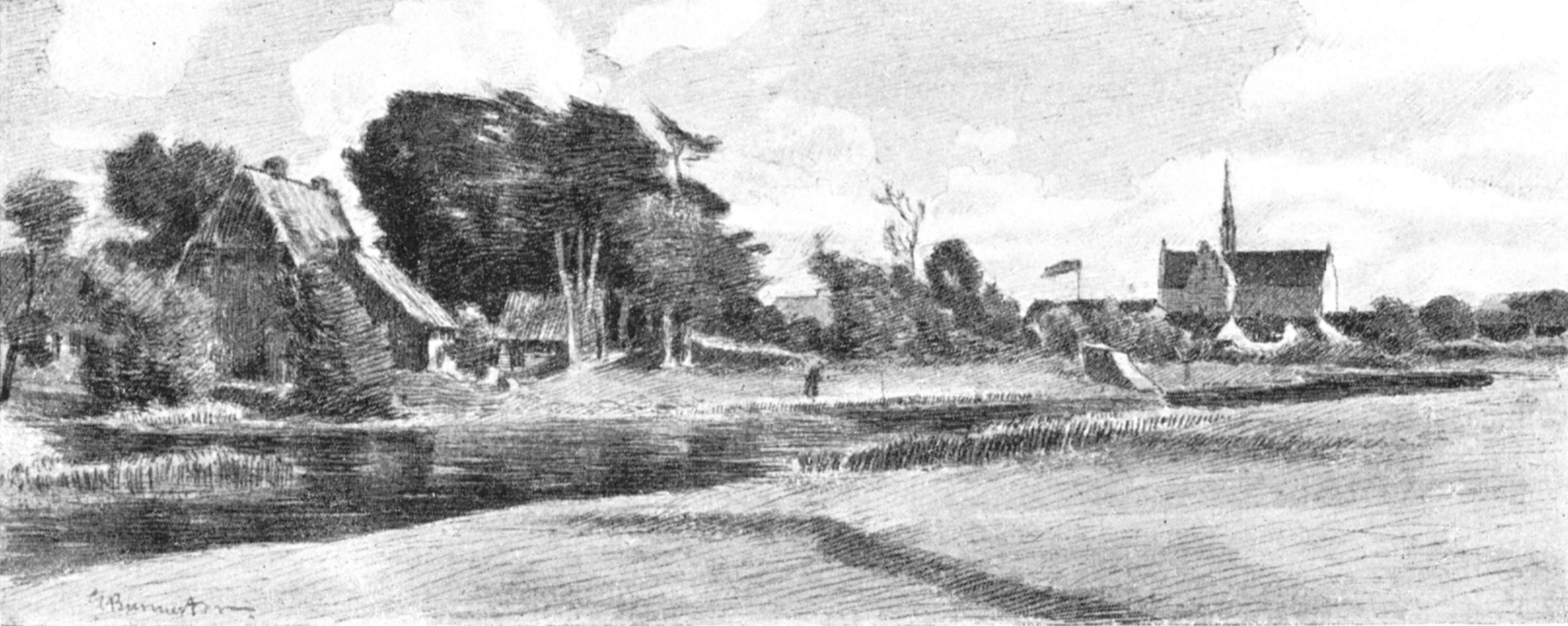 Løgumkloster, Zeichnung von Fritz Stoltenberg